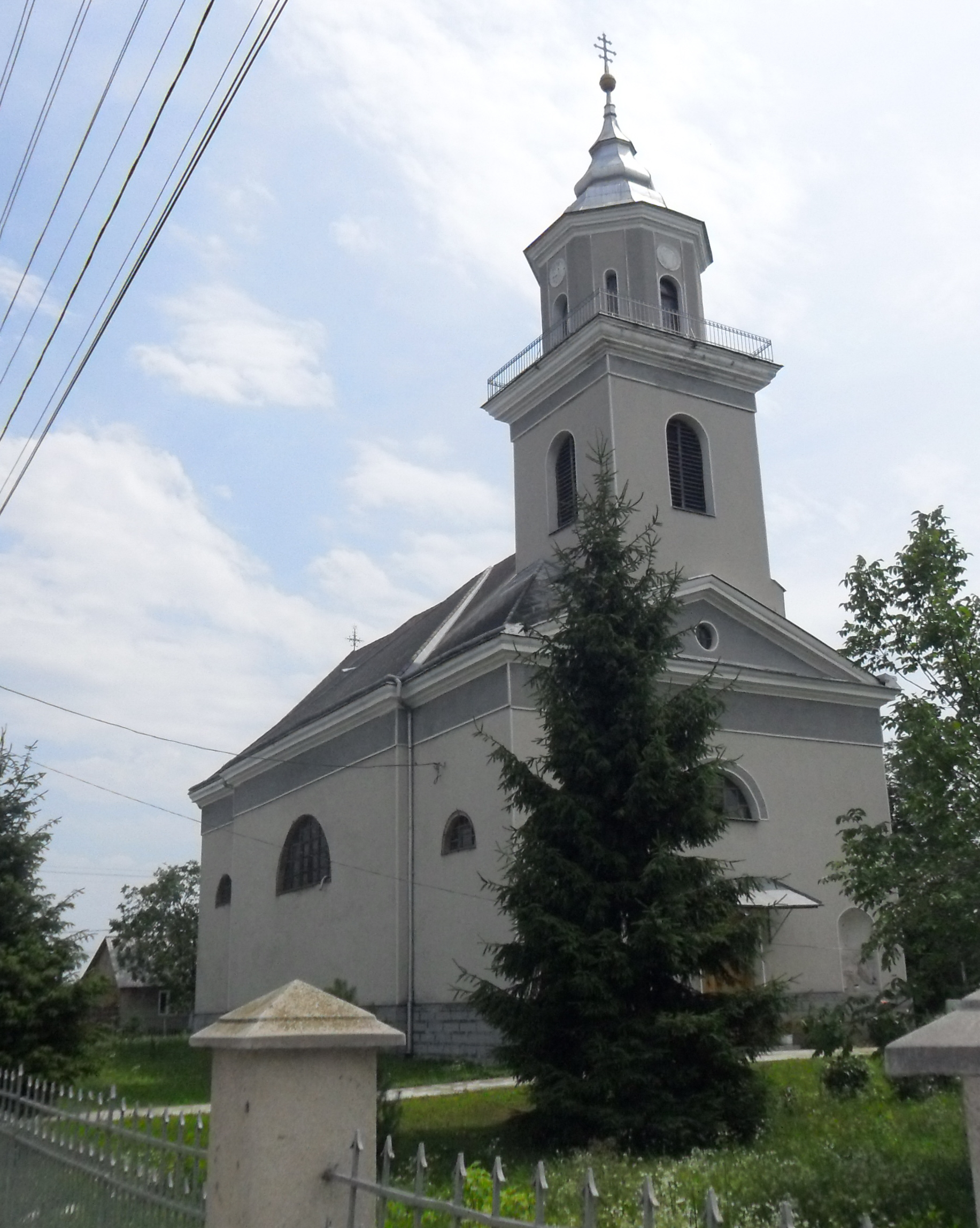 A tiszaújlaki görög katolikus templom (Kárpátalja, Ukrajna)